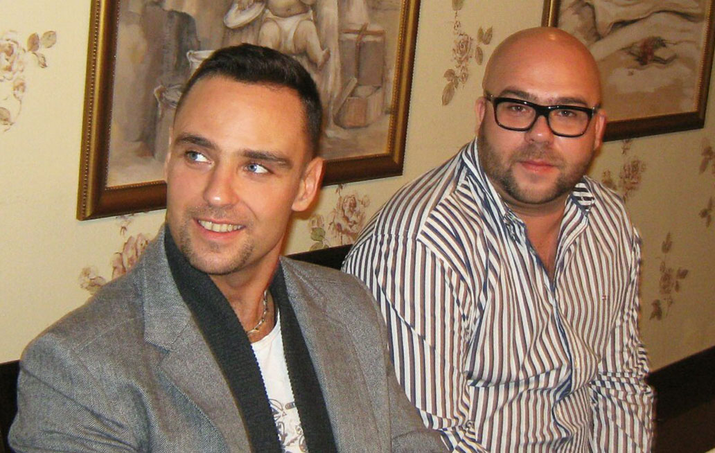 Засновники ПП ВД «Школа» Андрій (праворуч) і Василь Федієнки